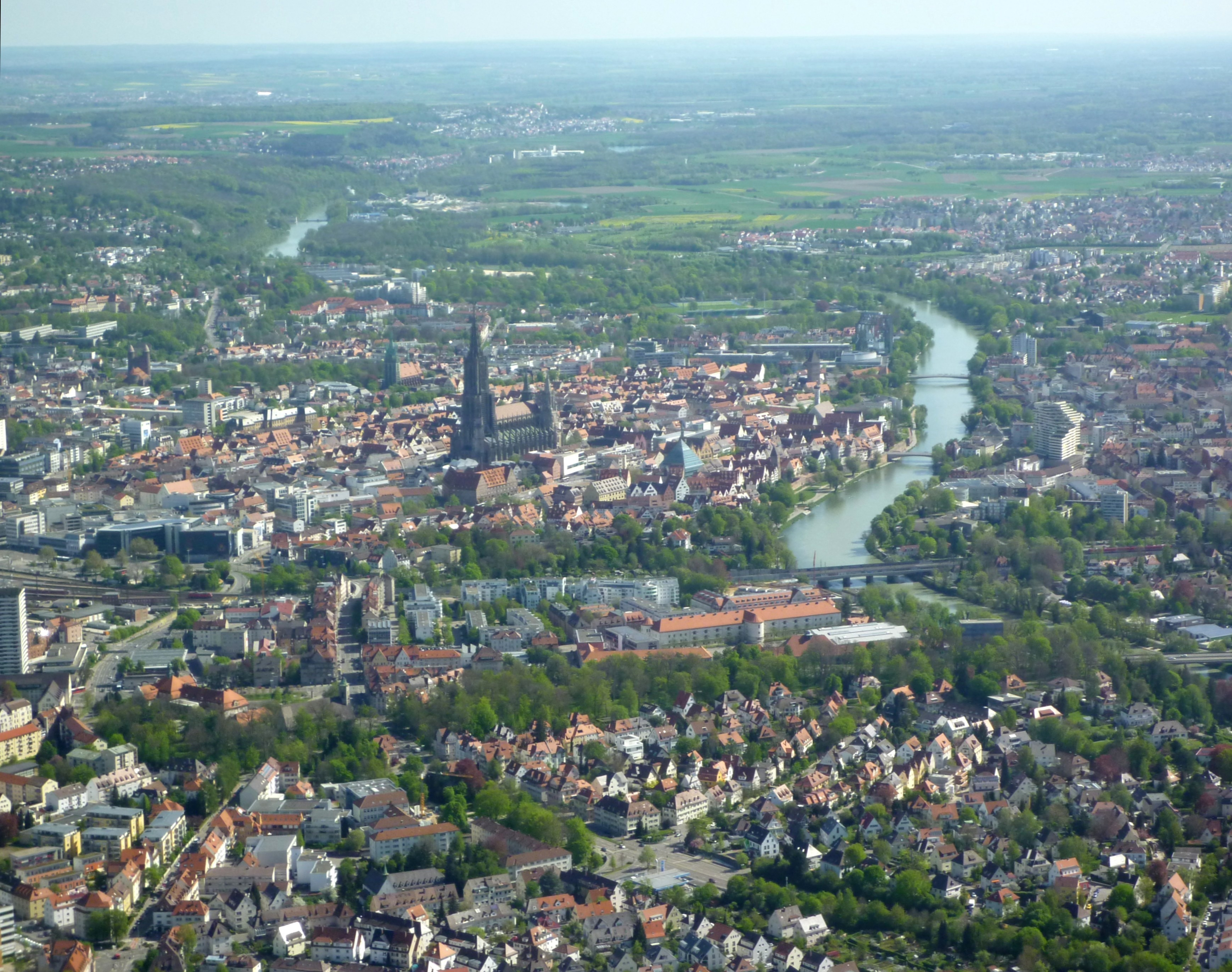 Ulm - Sicht aus dem Flieger auf Zentrum, Münster und Neu-Ulm